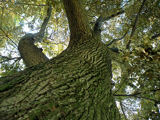 スダジイの幹